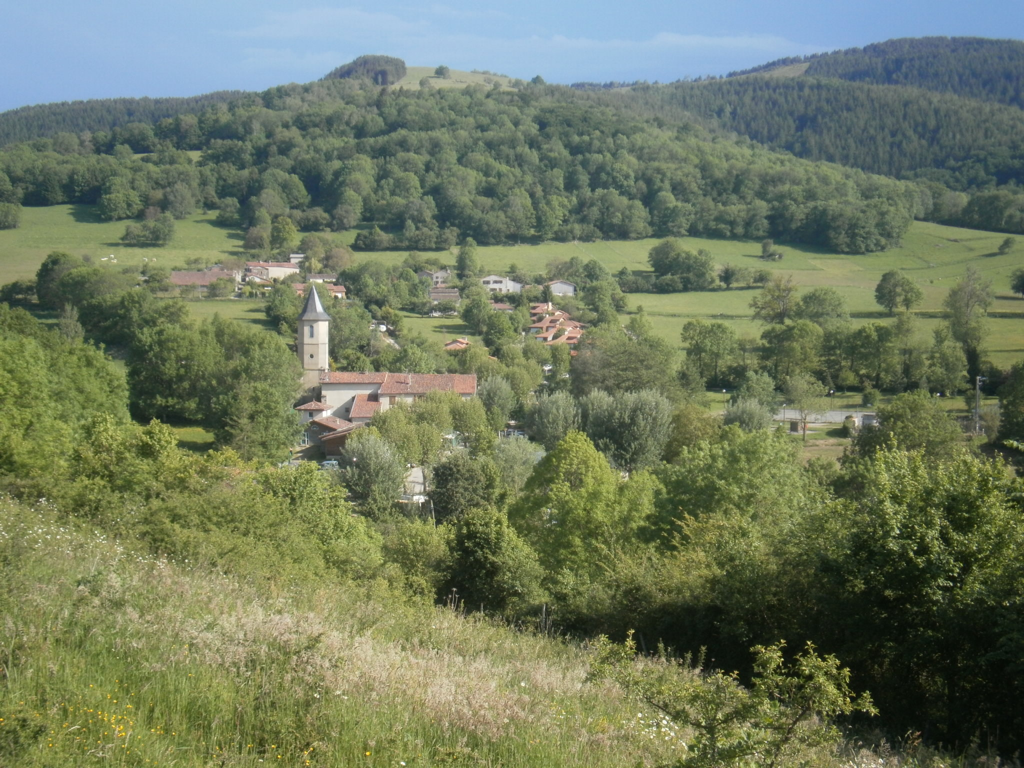 Village d'Alzen vu depuis le sentier qui mène à la chapelle.